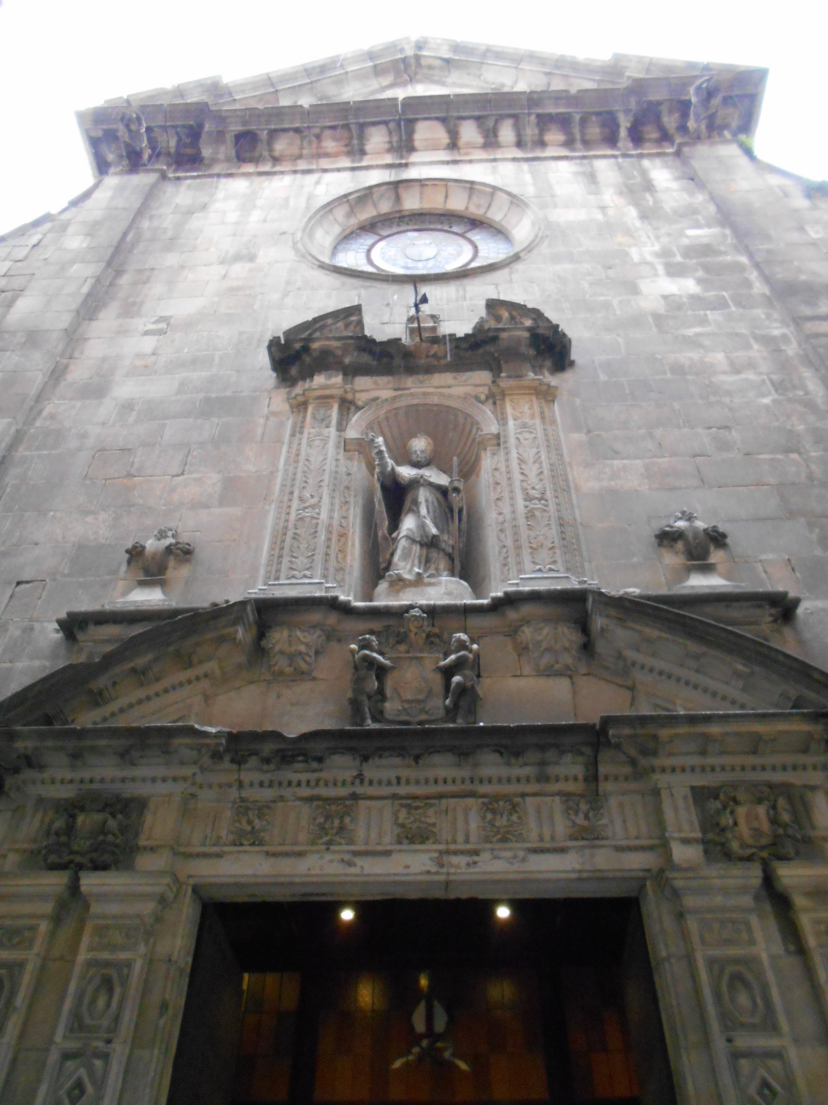 Iglesia de San Severo de Barcelona.